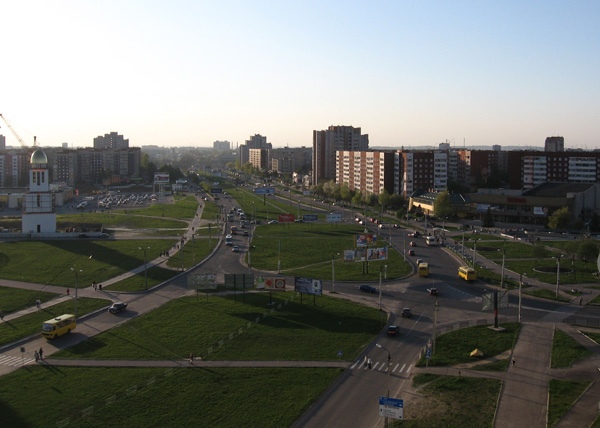 Сихів, Проспект Червоної Калини, 2 part